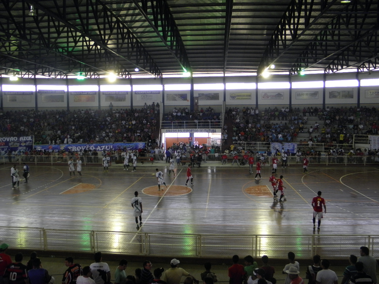 Ginasio de Esportes de Itaituba